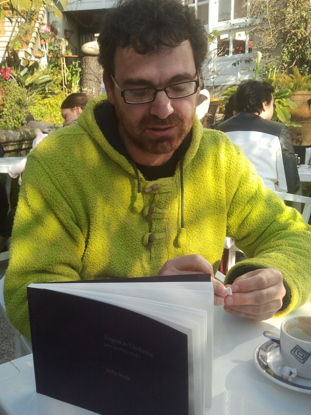 Séchu Sende nunha entrevista en 2013.